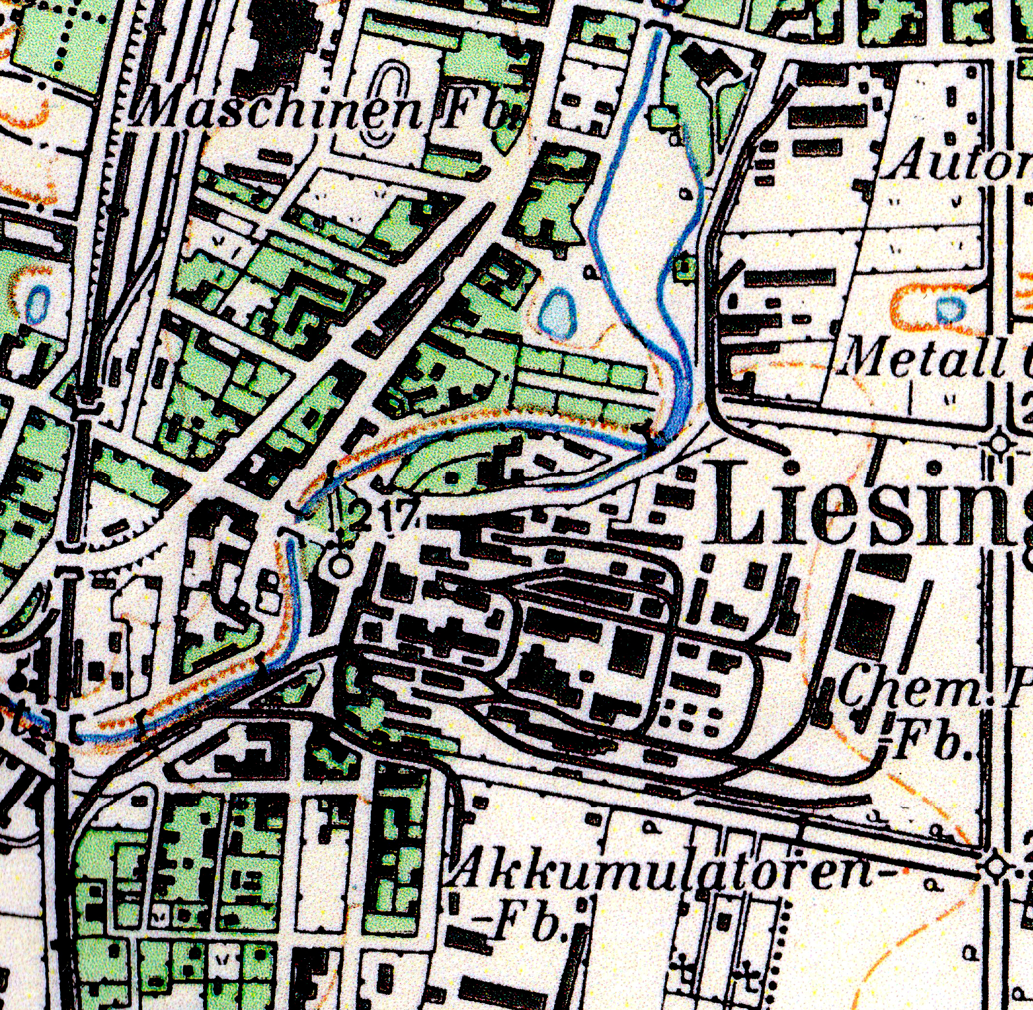 Ausschnitt aus: Gebietskarte Wien Umgebung 1:25.000 Bundesamt für Eich- und Vermessungswesen (Landesaufnahme) Wien Nr. 58/1 u.2 Purkersdorf-Liesing. Kartenberichtigung Westhälfte 1933, Osthälfte 1935. Hier: Gleise der Schleppbahn Liesing (hauptsächlich Fabriksbahn von Wagenmann & Seybel) östlich des Bahnhofes Liesing der Südbahn